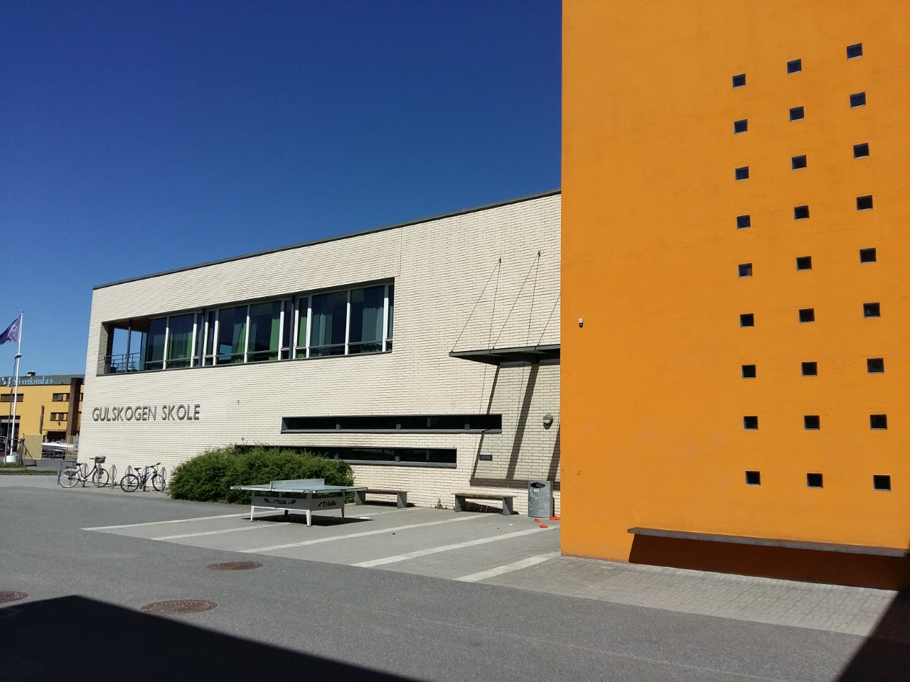 Gulskogen skole Drammen 2016